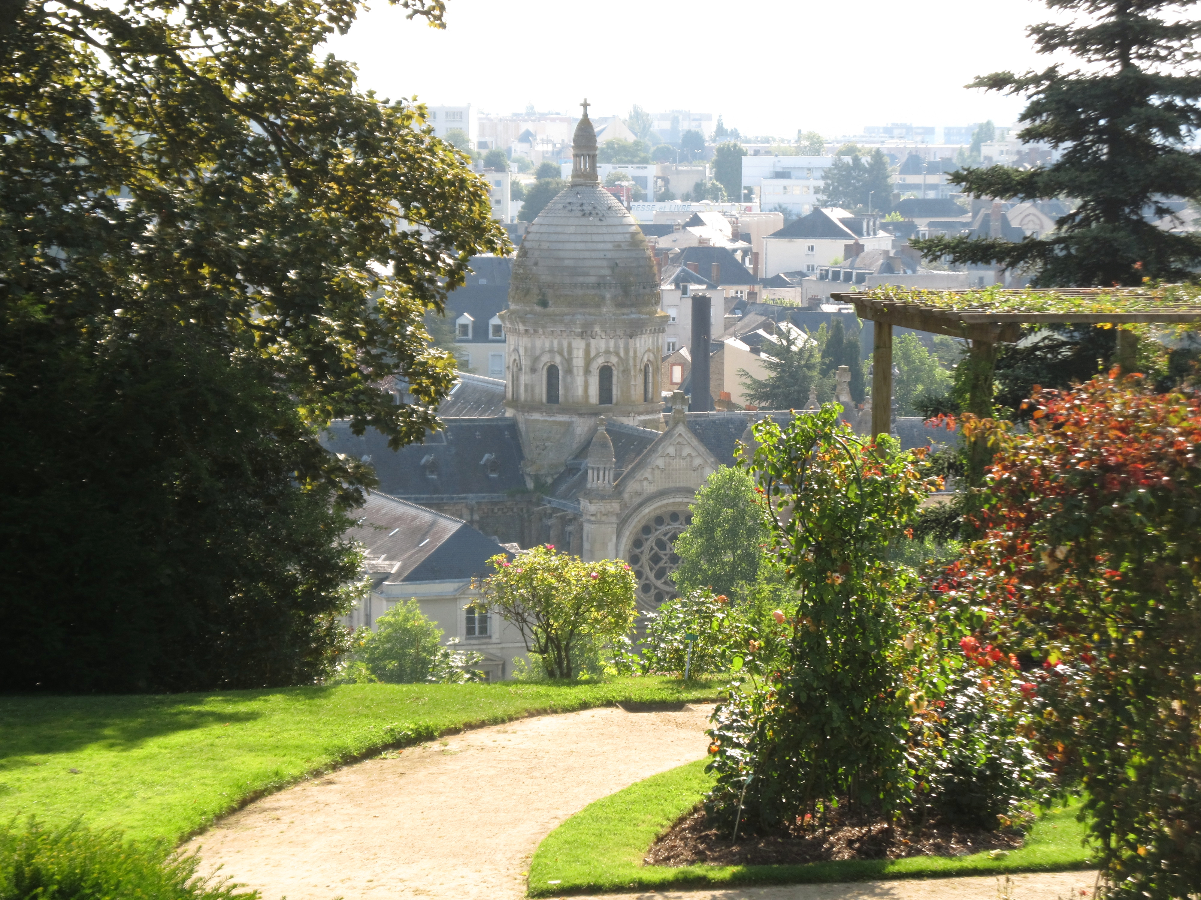 Jardin de la Perrine, Laval, Mayenne, France.